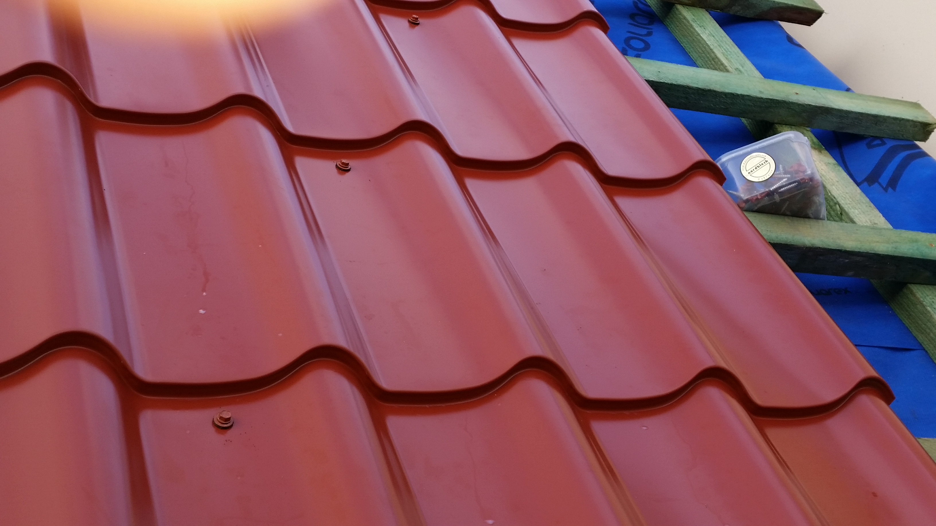 Dachpfannenblech Nordblech Klassik mit farbigen Edelstahlschrauben montiert